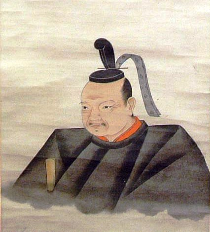 戦国・安土桃山時代の武将、吉川元春の肖像画。